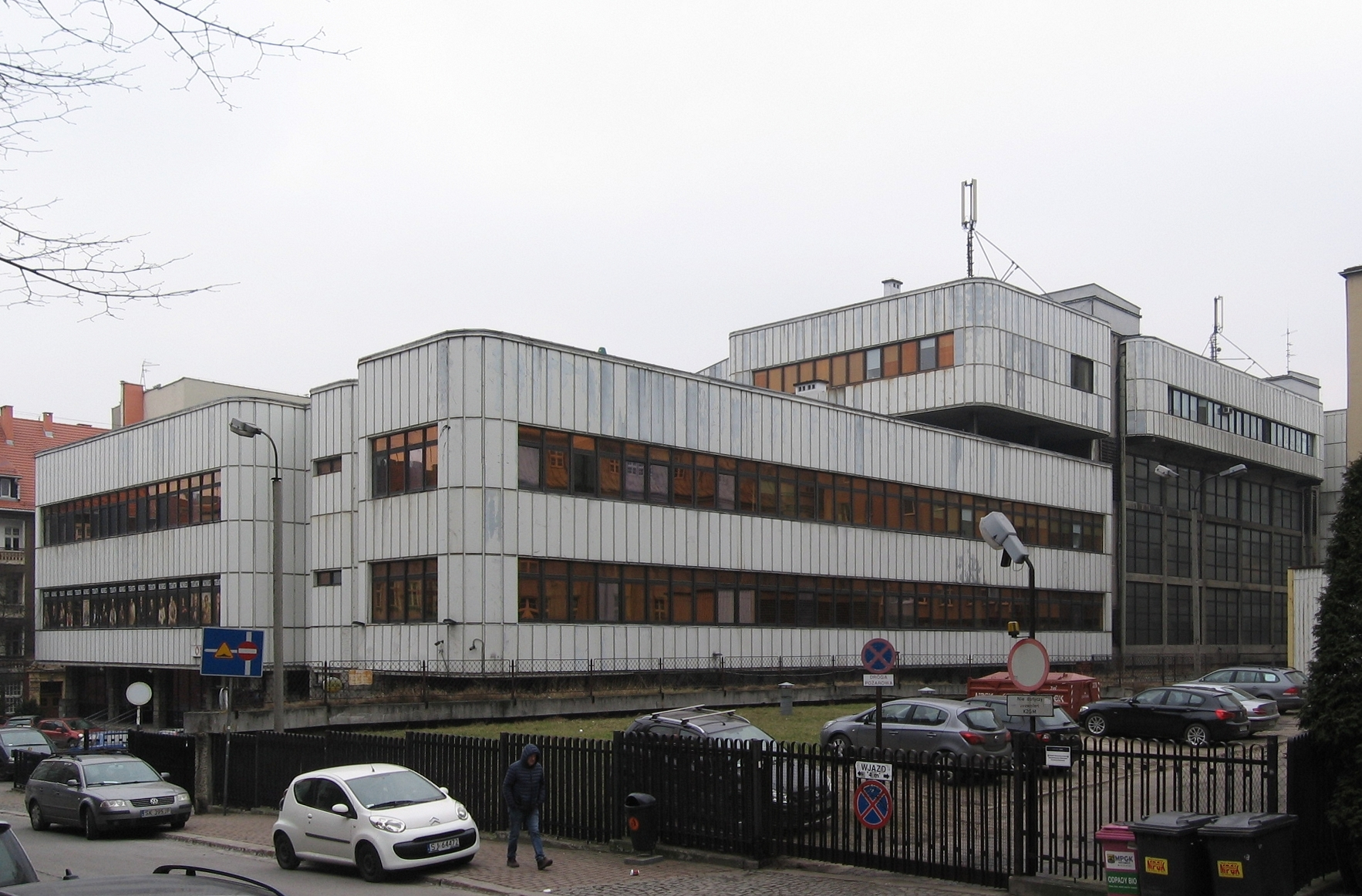 The building in Katowice, plac Sejmu Śląskiego 2.